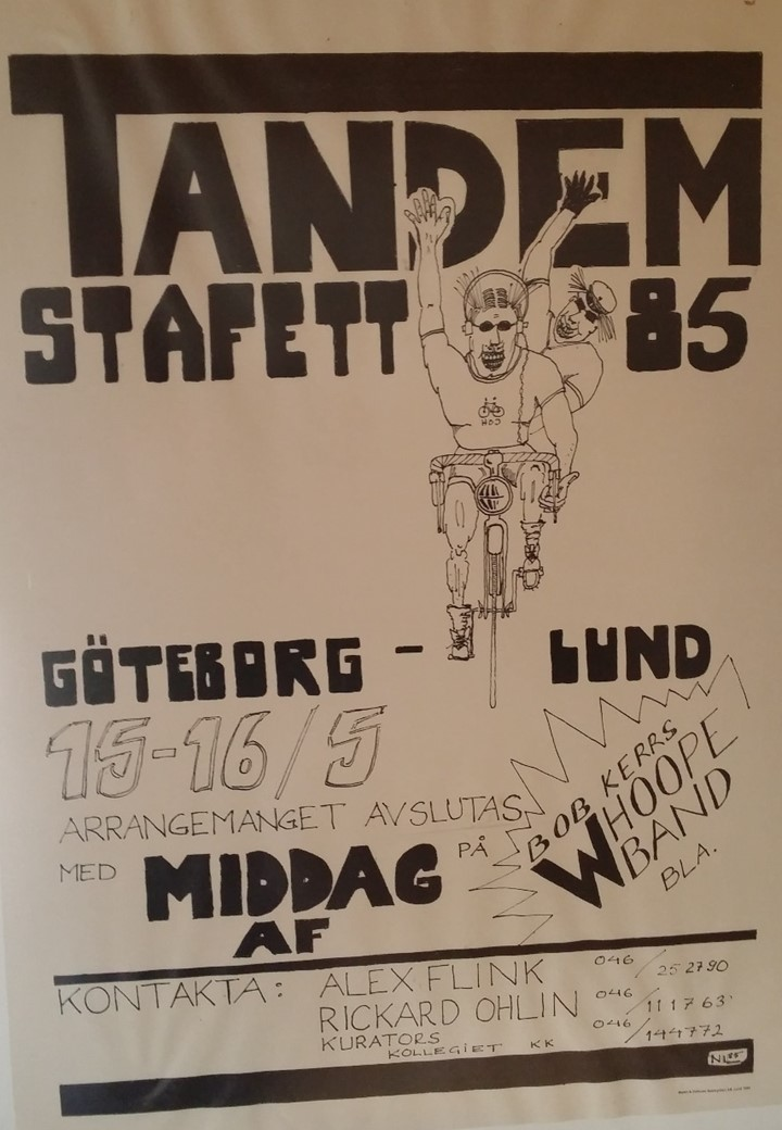 Affich från tandem staffeten 2015. Skapad av Nils Lundberg och tryck på Wahlin och Dalholm i Lund